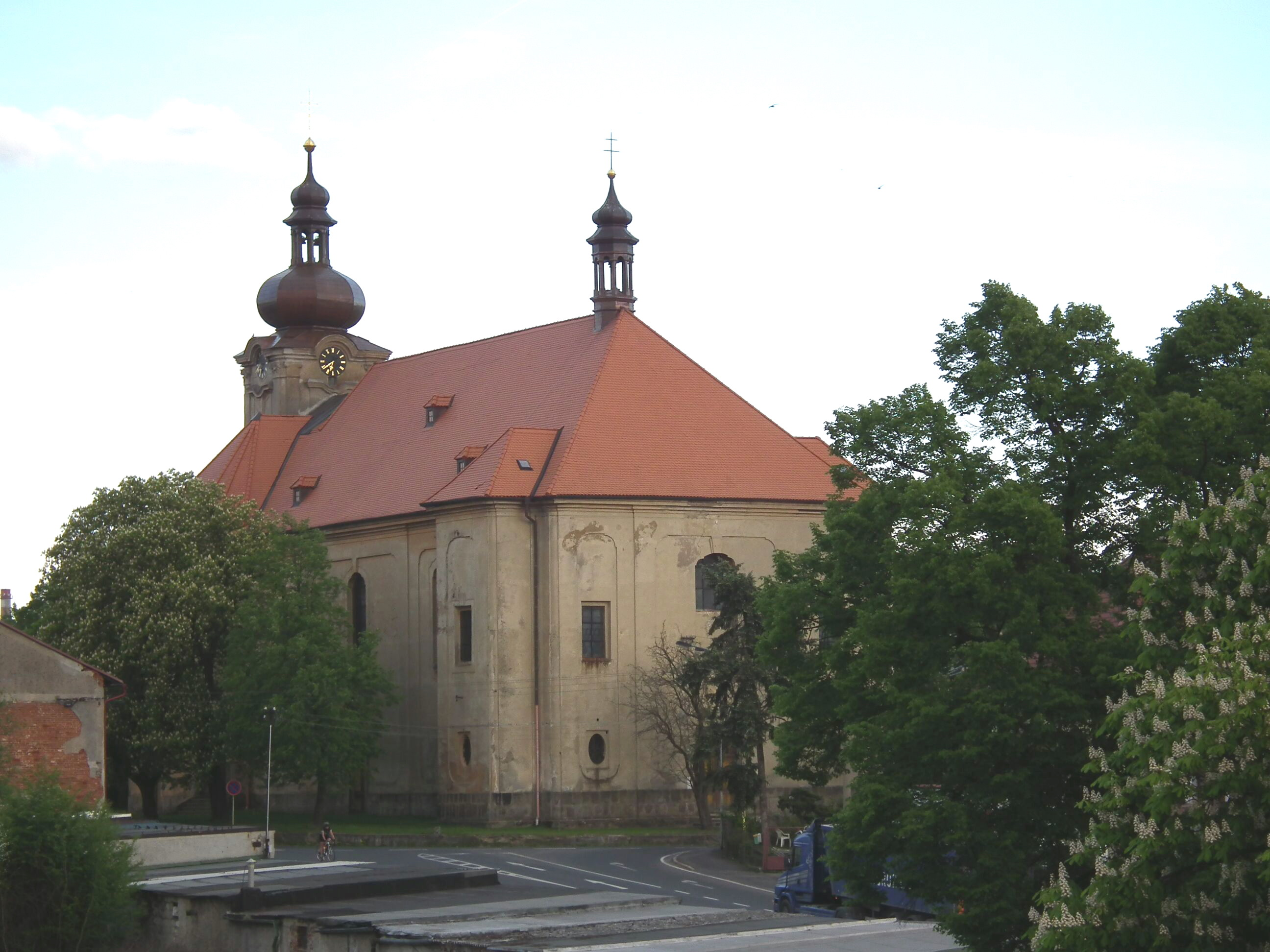 St. Anna Kirche in Zettlitz bei Karlsbad